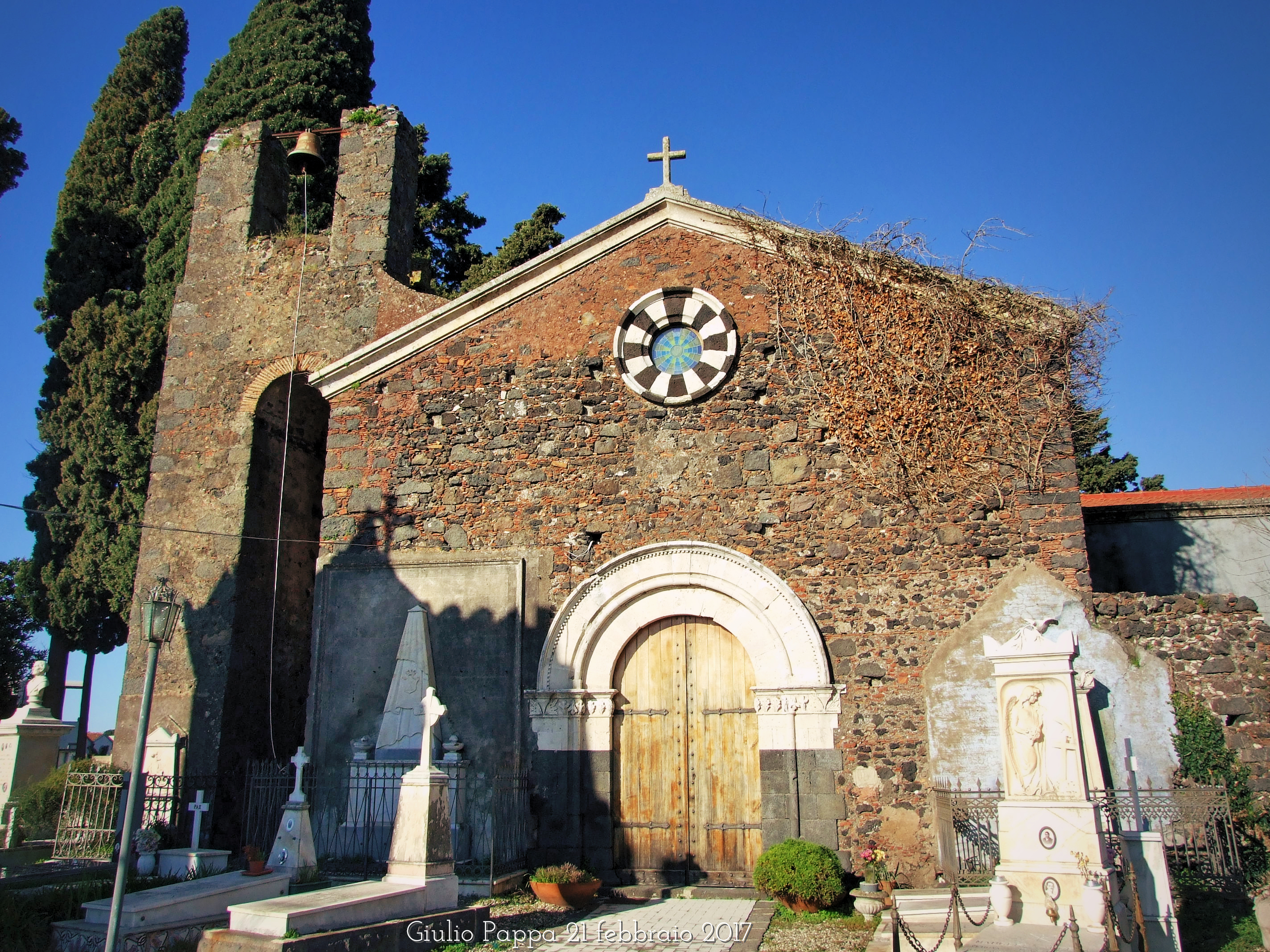 Tempio di Sant'Antonio Abate (Mascalucia, Sicilia)